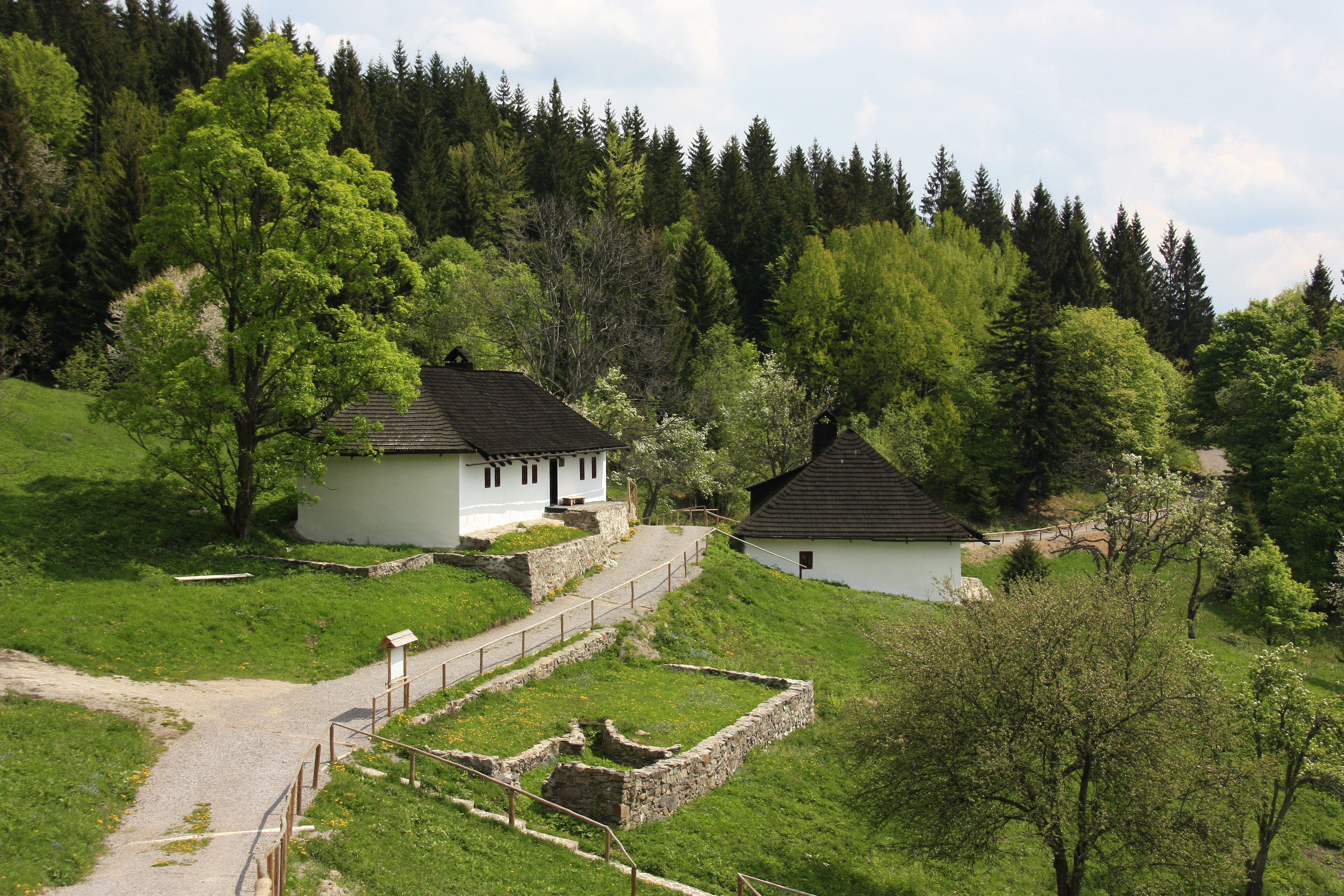 601-167/1 Baláže - Priestor pamätný